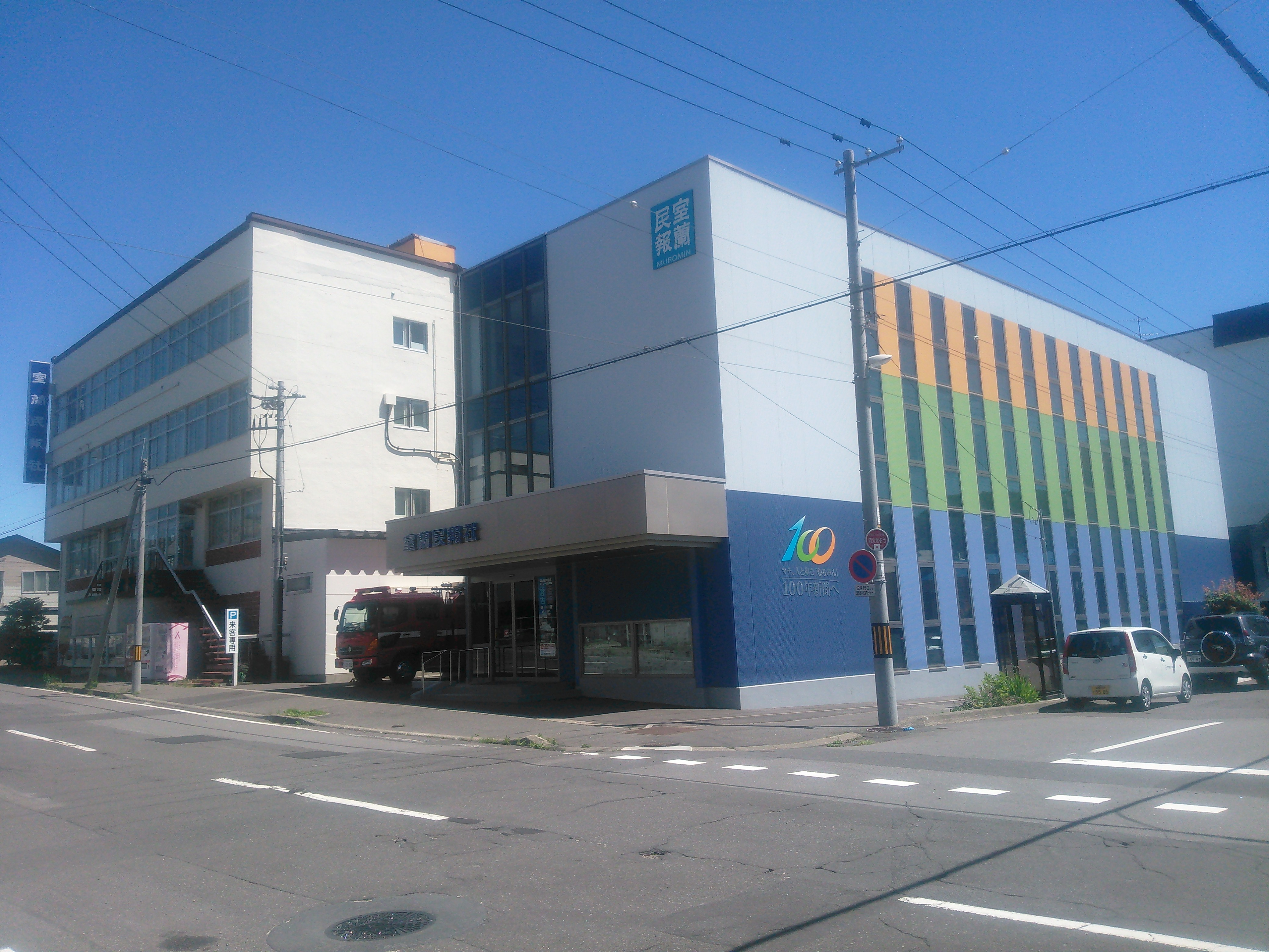 北海道室蘭市、室蘭民報社社屋。2017年竣工の、通称「平成新館」